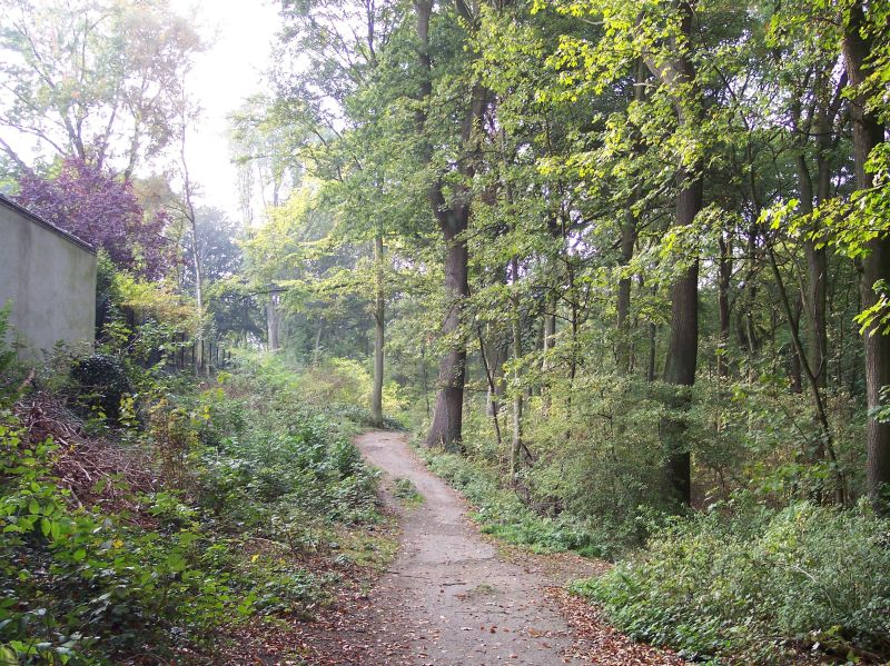 Dortmund Bolmke, Zugang von der Fritz-Kahl-Straße Source: Own image